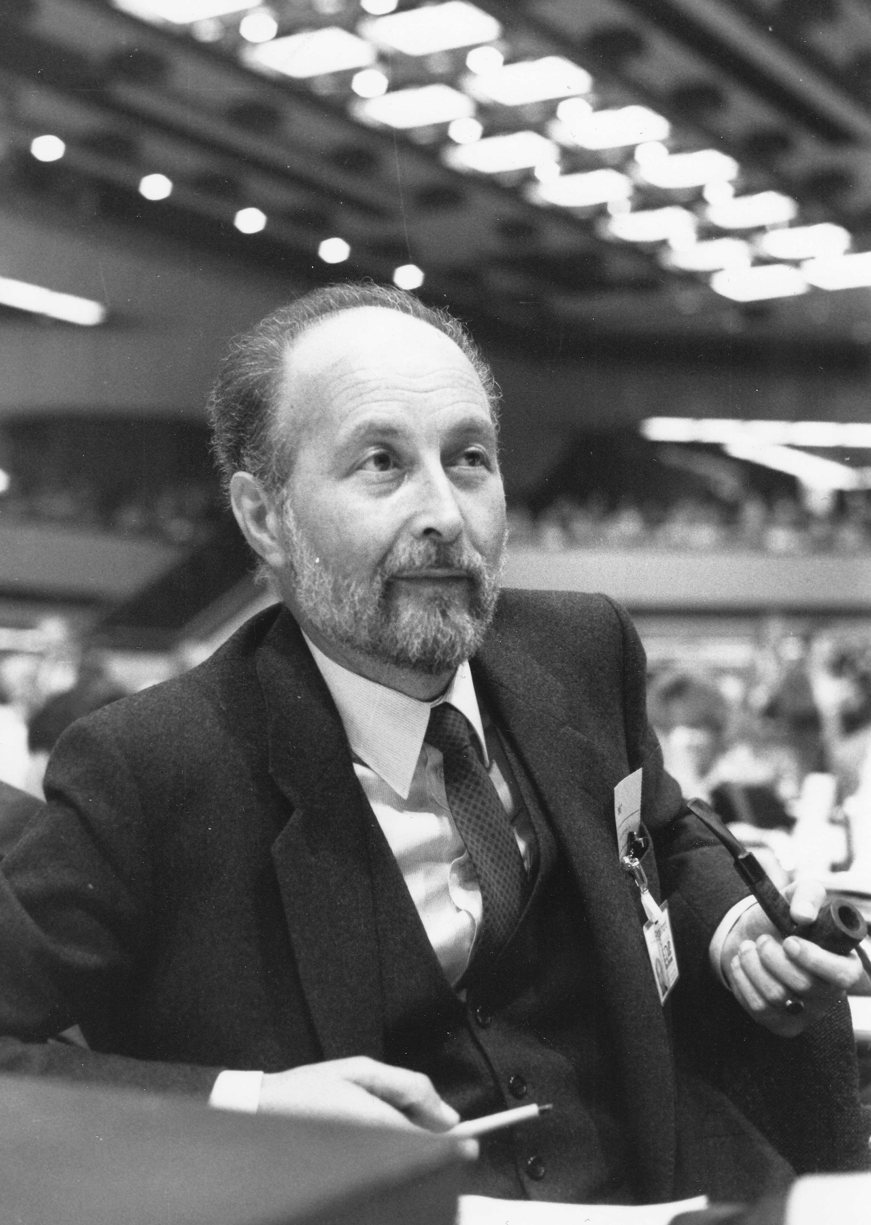 Hans Arnold Engelhard (* 16. September 1934 in München; † 11. März 2008 ebenda) war ein deutscher Politiker (FDP). Er war von 1972 bis 1994 Mitglied des Deutschen Bundestages und von Oktober 1982 bis Januar 1991 Bundesminister der Justiz. Engelhard auf dem FDP-Bundesparteitag 1982 in Berlin